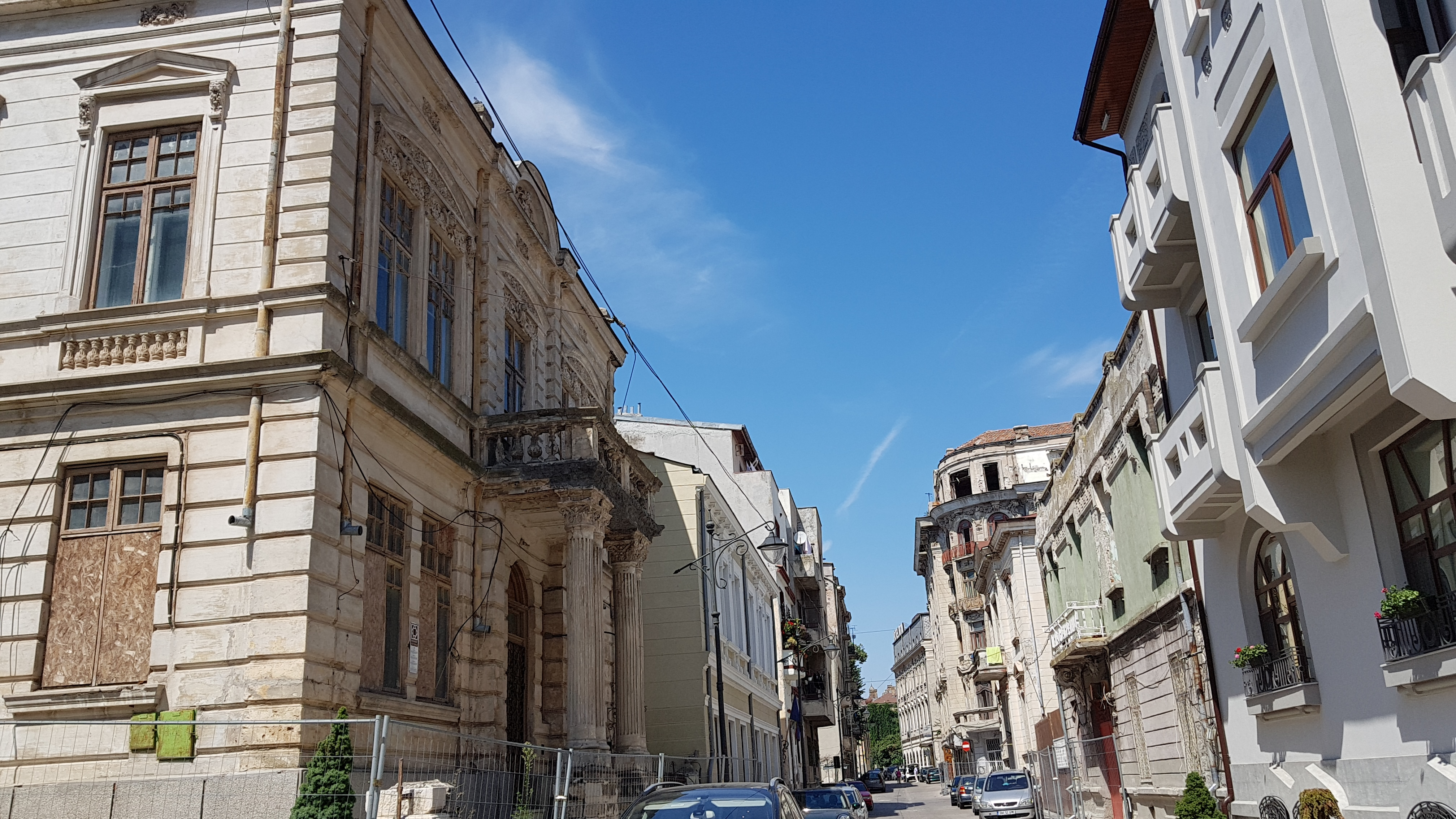 Situl urban „Zona peninsulară Constanța” 01